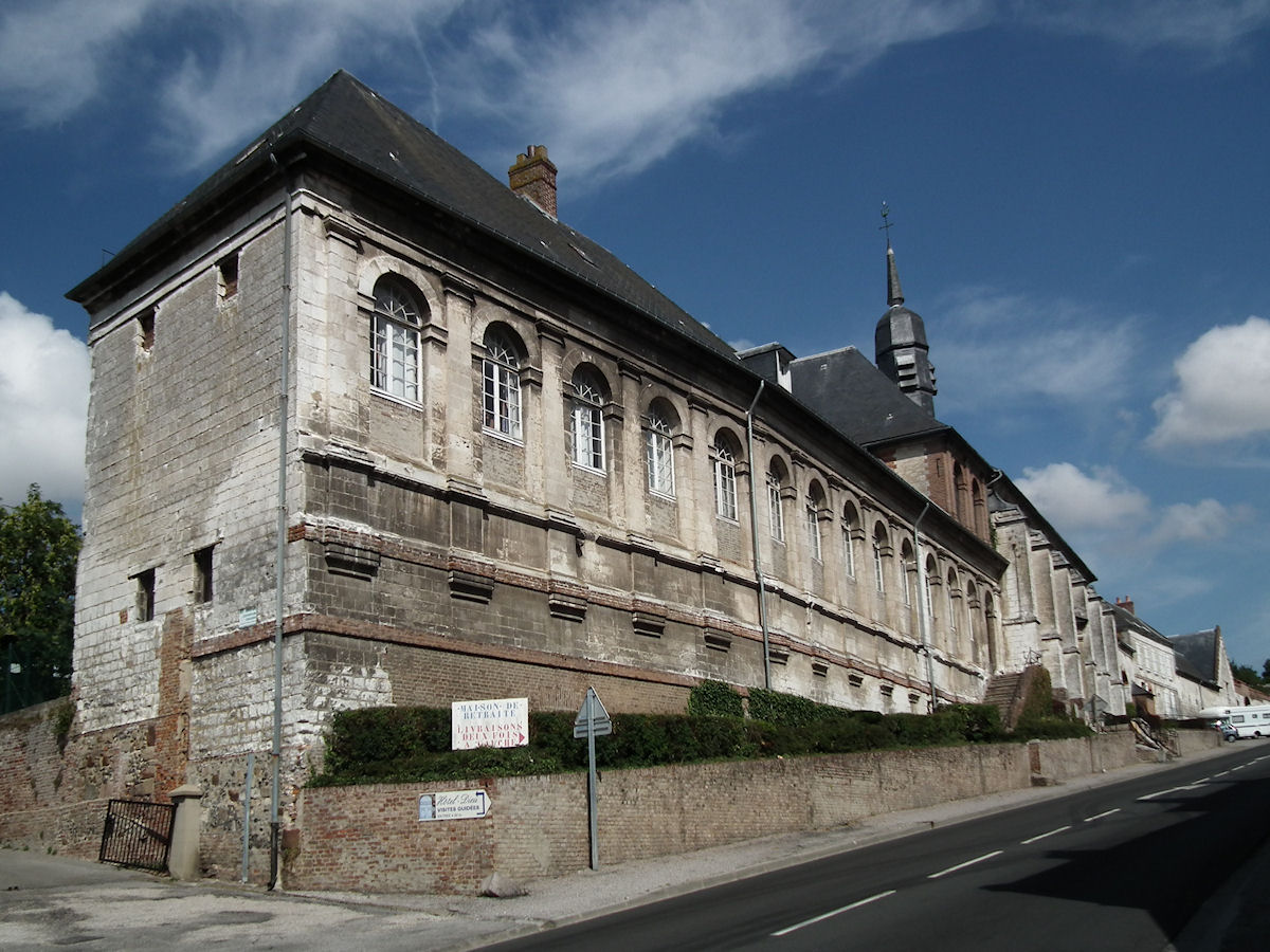 Hôtel-Dieu, Saint-Riquier, Somme, Picardie, France